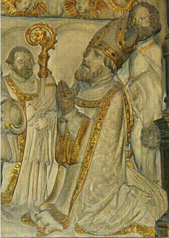 Darstellung des Fürstbischofs Friedrich von Wirsberg auf seinem Epitaph im Würzburger Dom